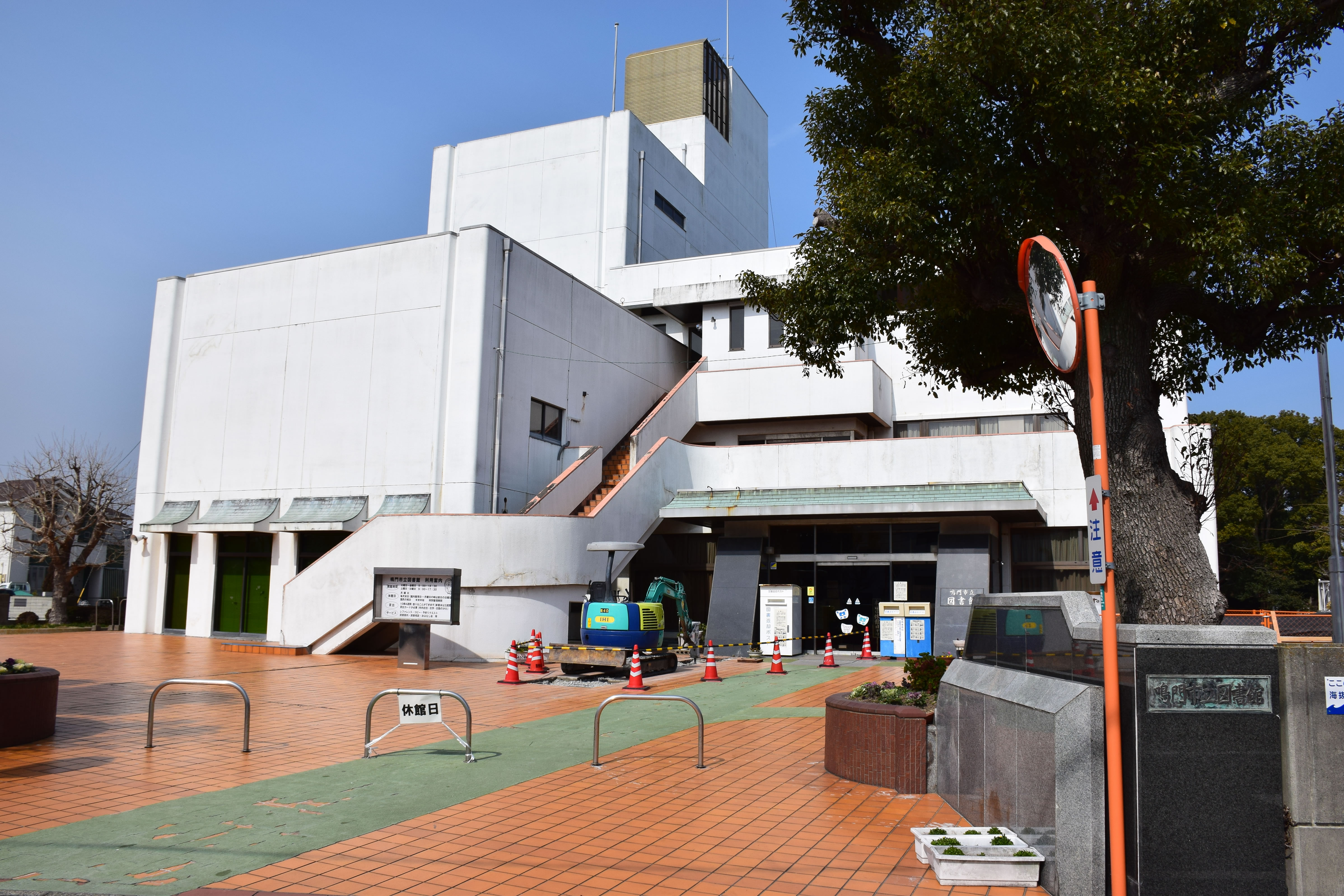 鳴門市立図書館